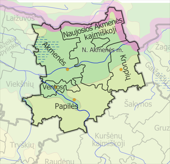 Padaryta iš lt::File:LietuvosSeniunijos.png